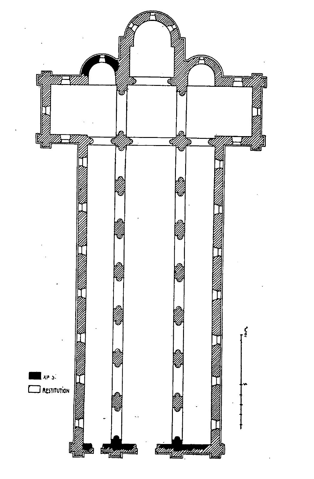 Plan reconstitué au XIe siècle.